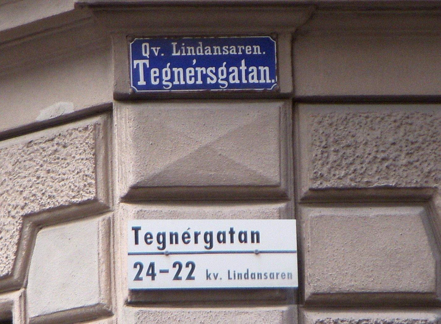 Tegnérgatan i Stockholm, gamla och nya gatuskylten i kvateret Lindansaren